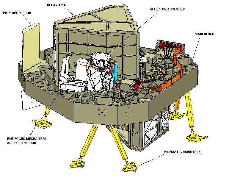 JWST space telescope : Fine Guidance Sensor/Near InfraRed Imager and Slitless Spectrograph (FGS/NIRISS)